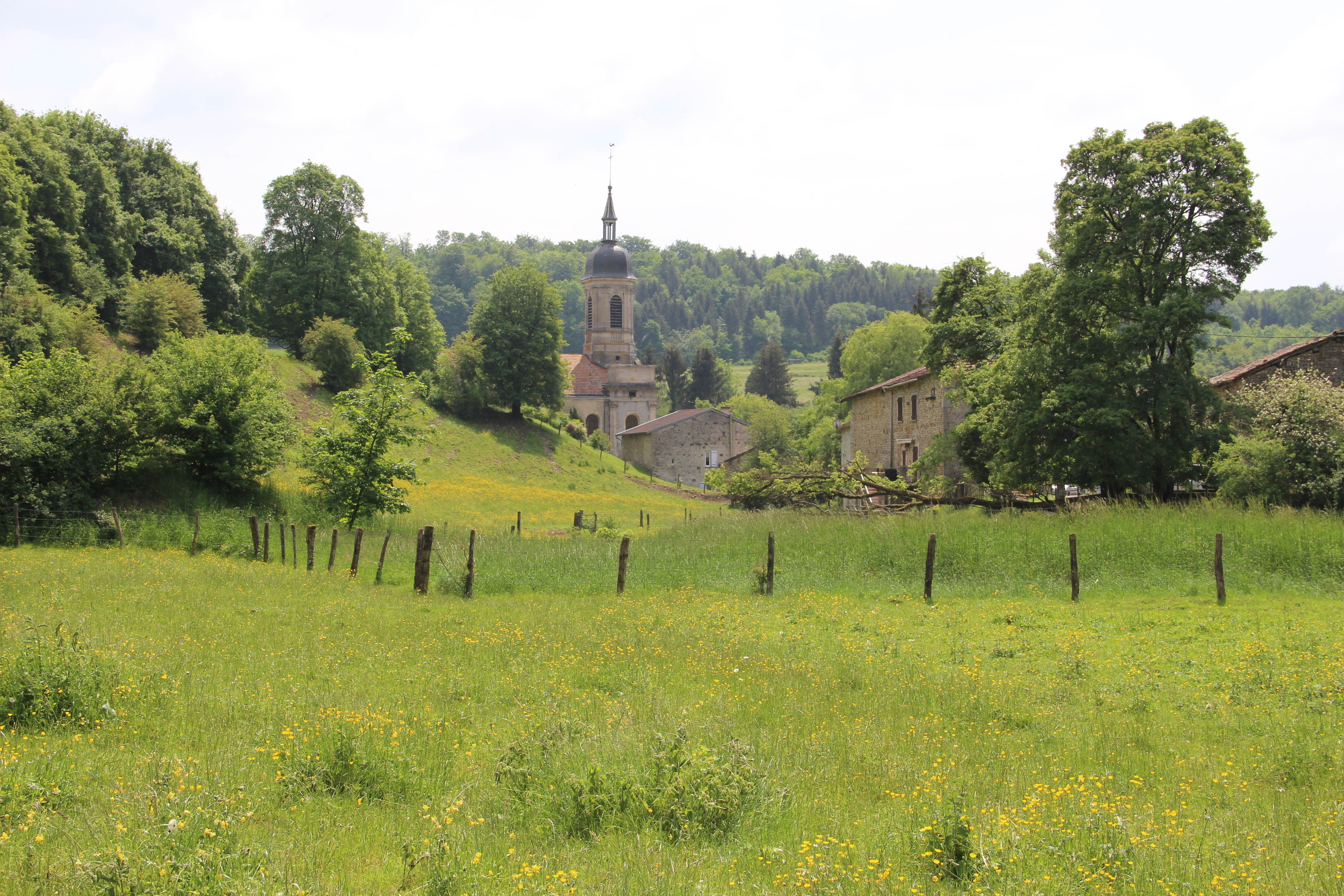 Vue du village